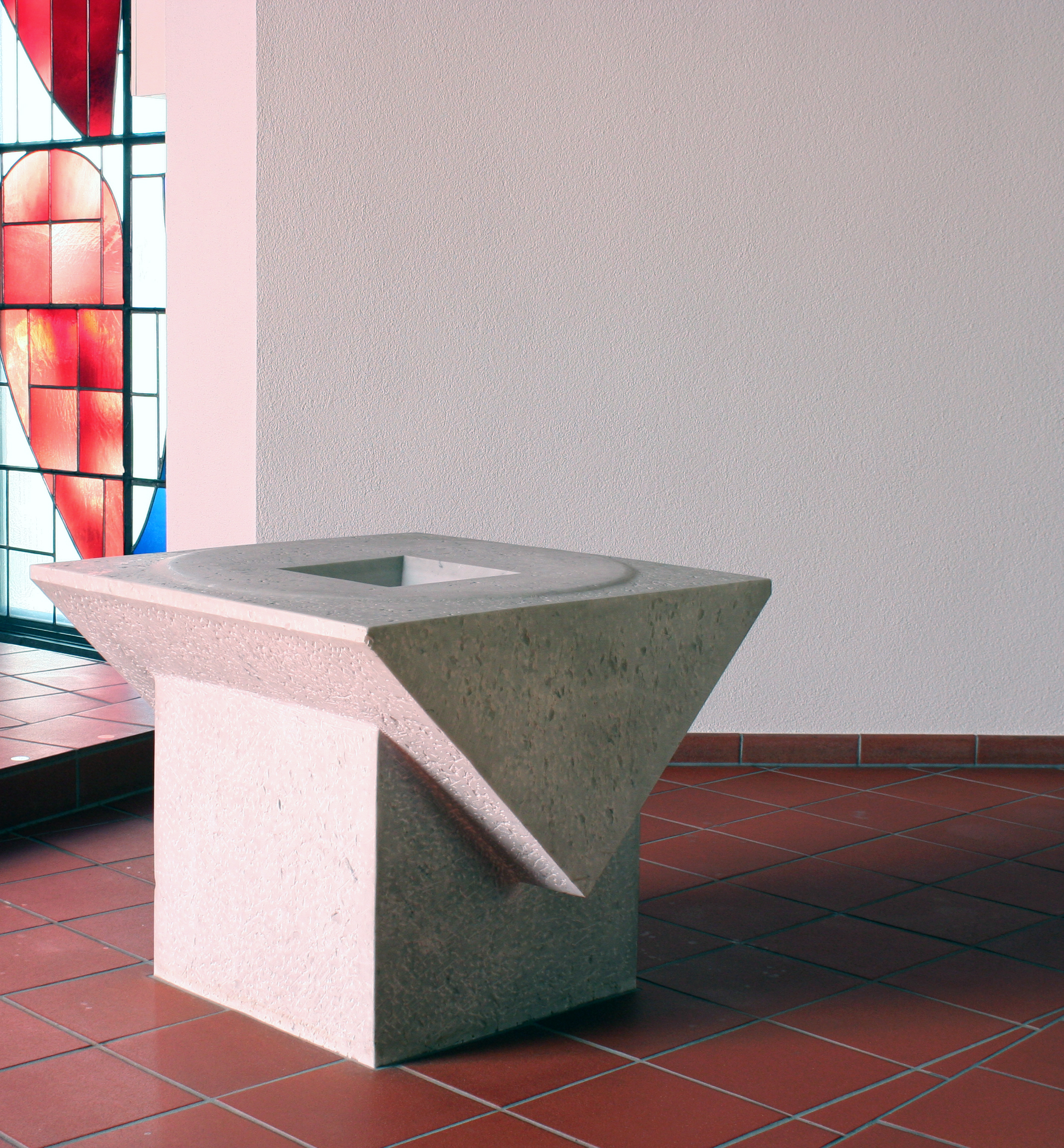 Römisch-katholische Pfarrkirche St. Antonius Wallisellen, Taufbecken